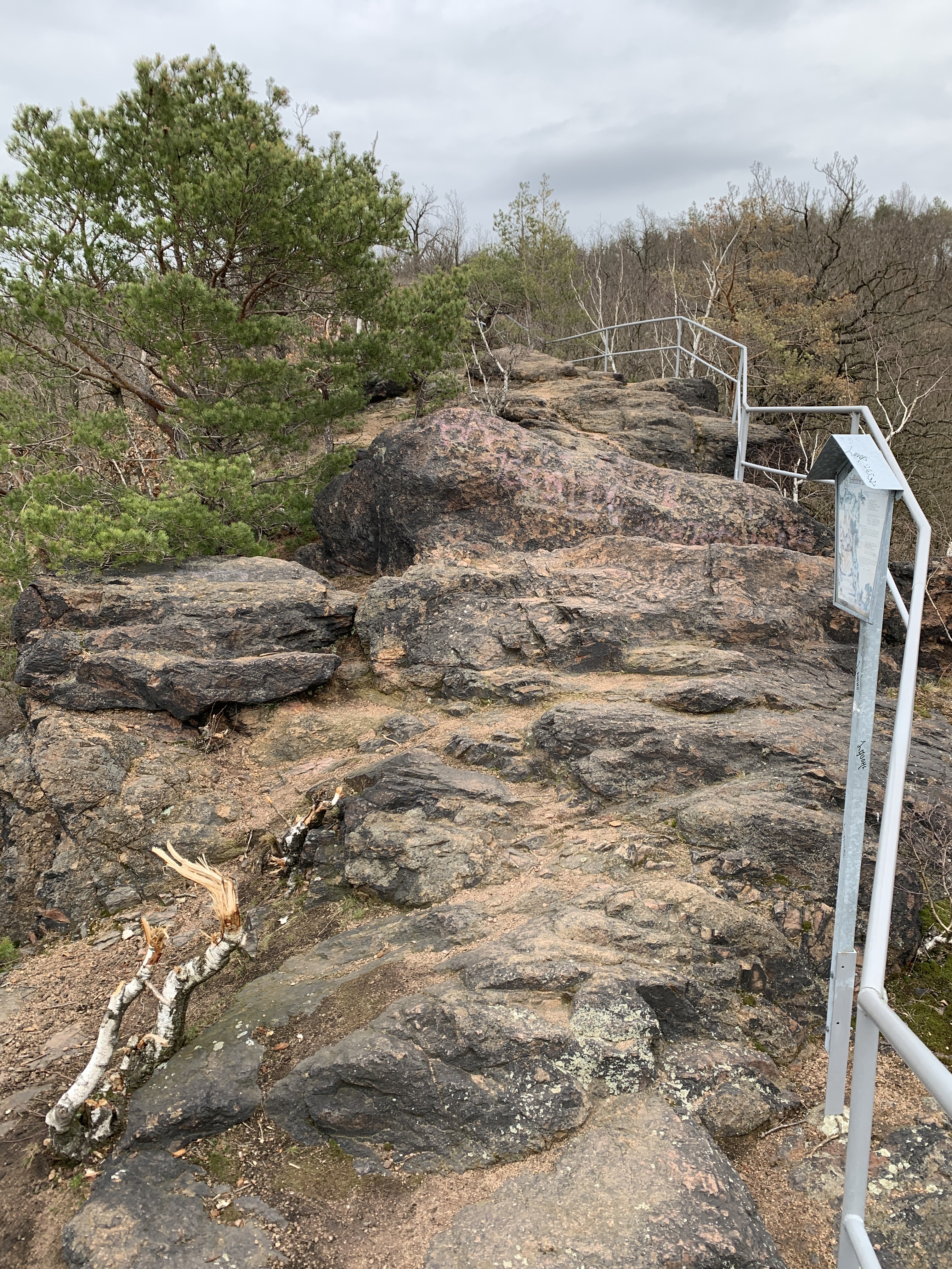 auf dem Gipfel vom Hohen Stein im Spitzgrund von Coswig